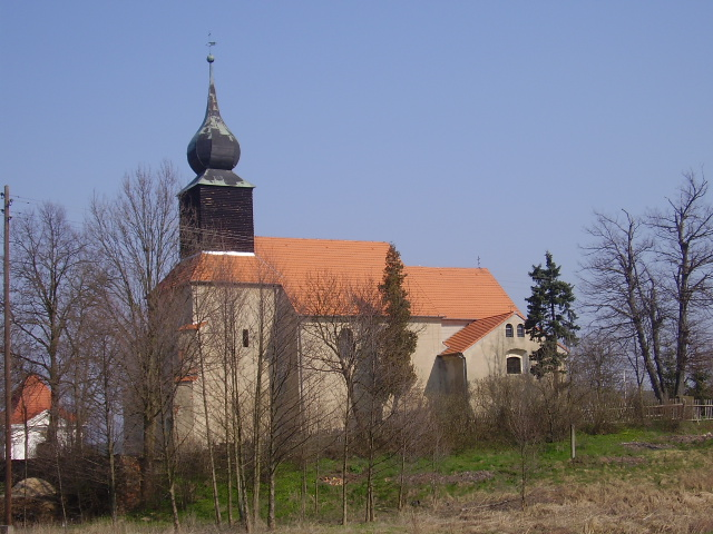 Leśniów Wielki - kościół p.w. Wniebowzięcia NMP (zabytek nr 60 z 23.07.1955)